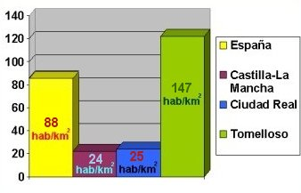 Gráfico comparativo de los habitantes por kilómetro cuadrado a niveles, nacional, regional, provincial y local.